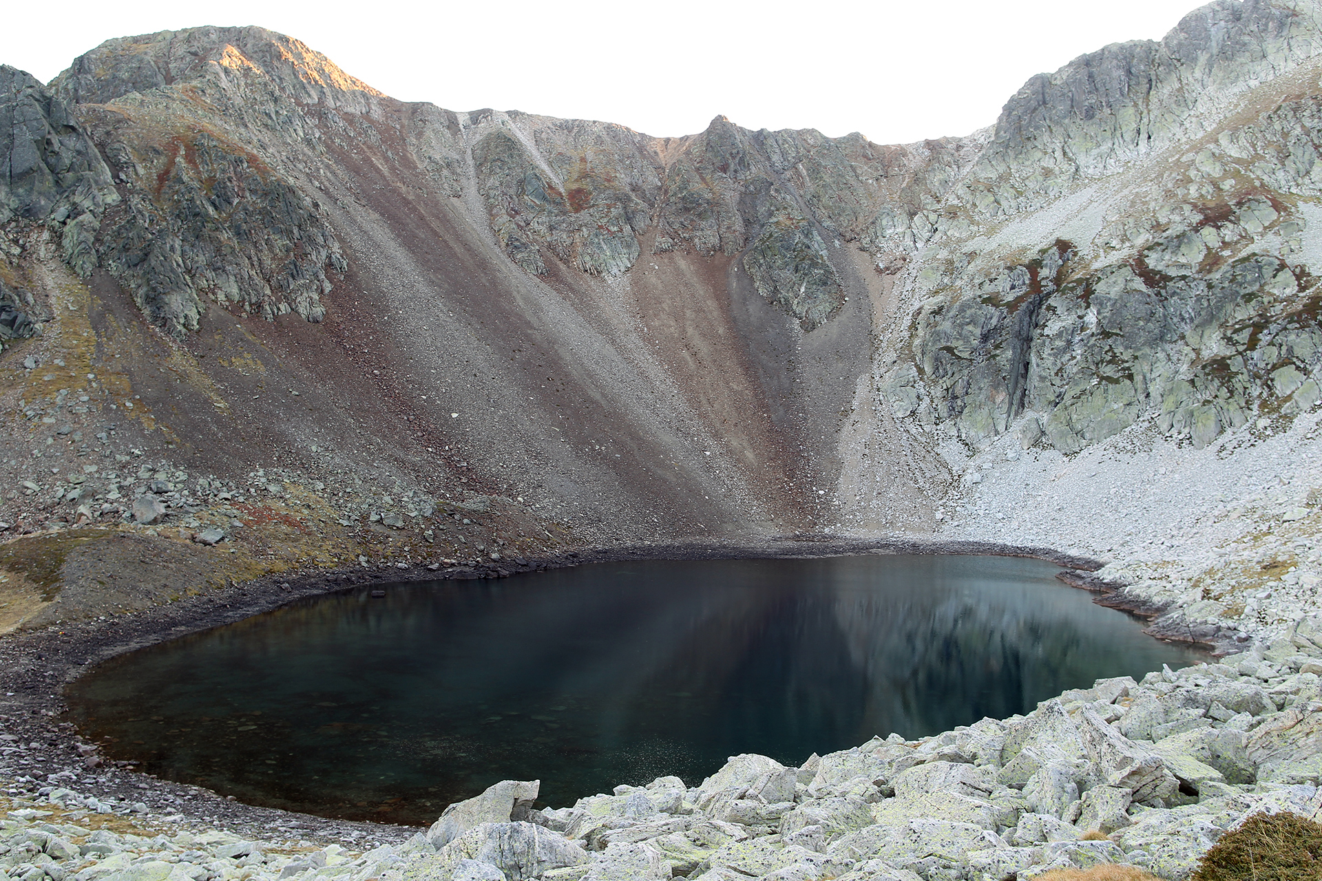 Riberas del río Carrión y afluentes This is a photography of a Site of Community Importance in Spain with the ID: ES4140011. Natura2000 entry, EEA entry